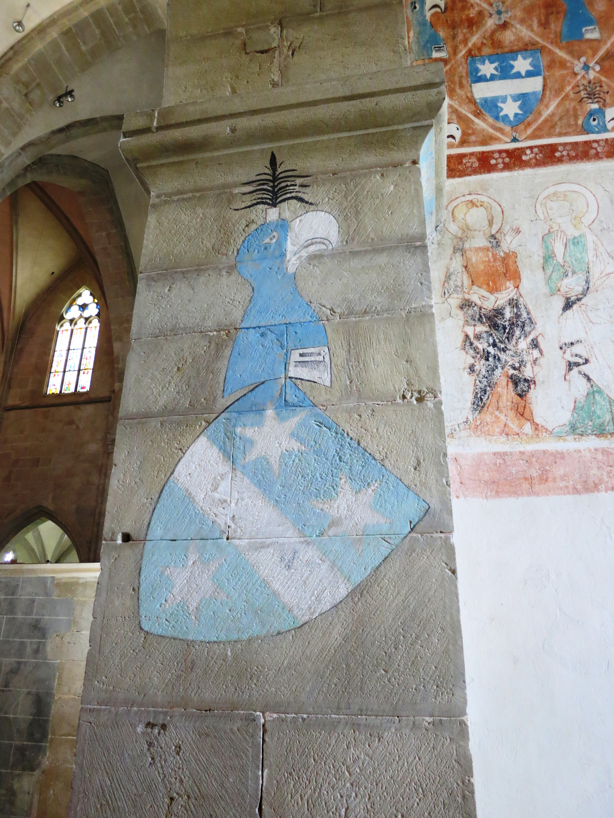 Gessler von Brunegg, Kloster Kappel, Kappel am Albis ZH, Schweiz